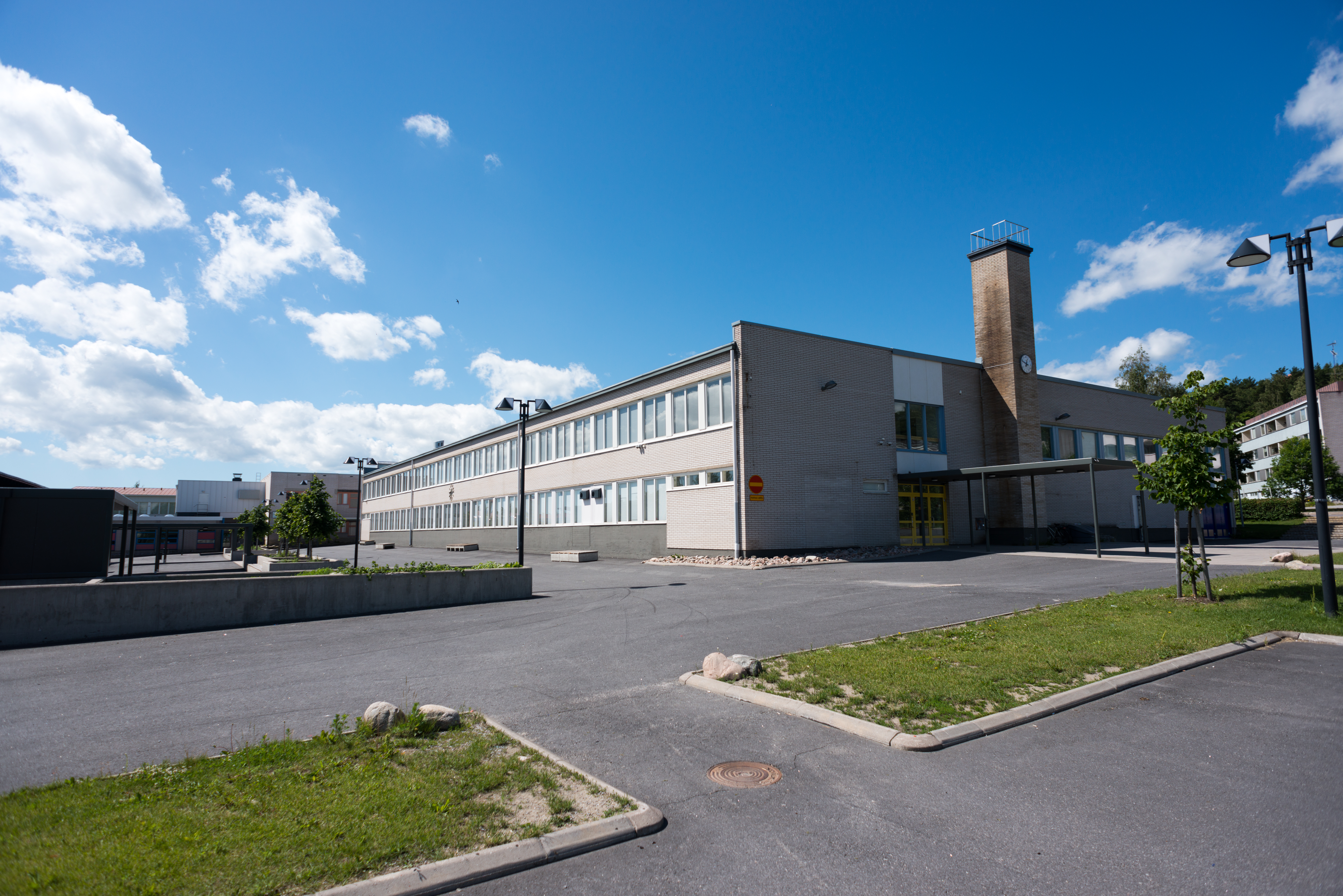 Armfeltin koulu Halikossa